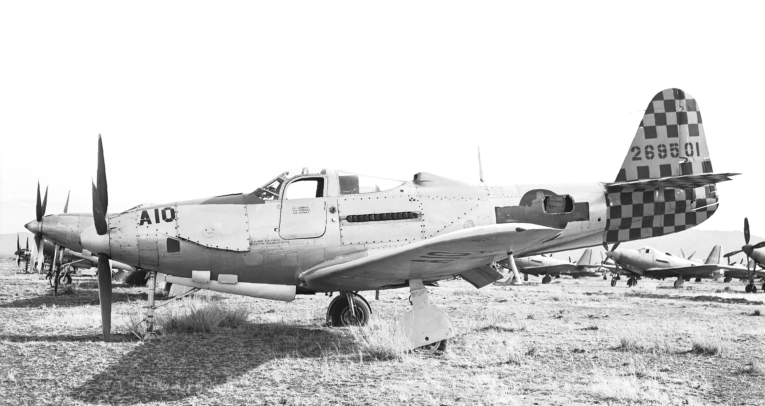 Kingman, Arizona, February 1947.